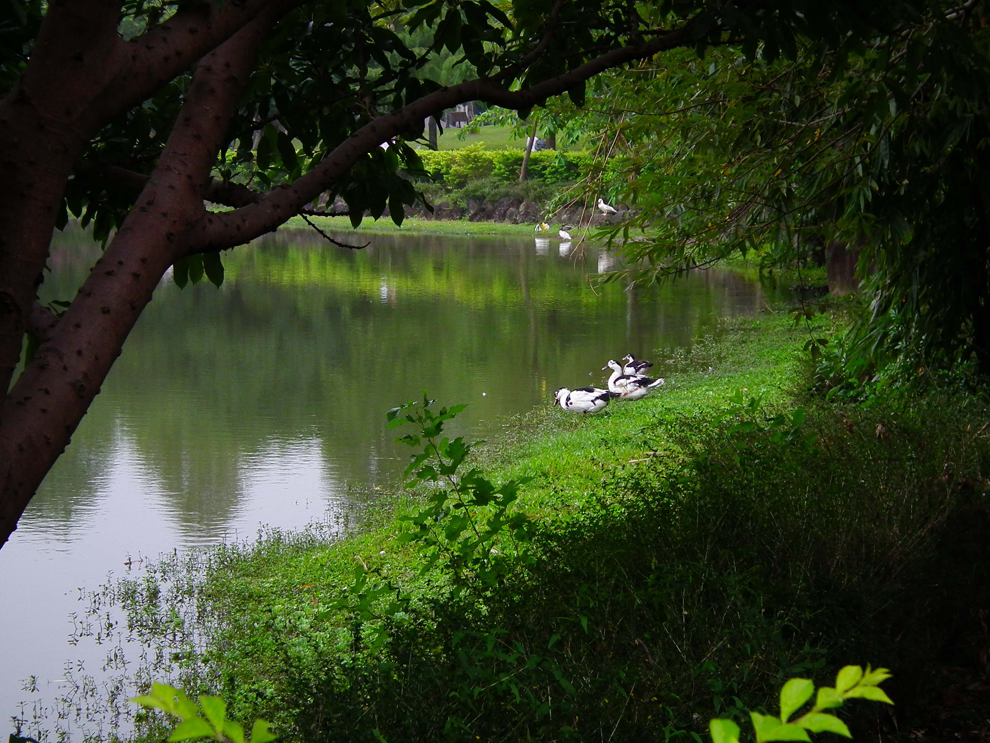 Eco Pond in Daan Forest Park 大安森林公園生態池